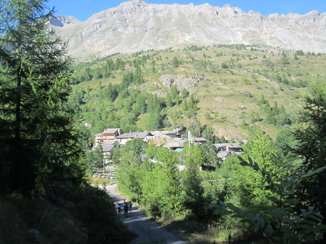 Saretto (Piedmont)